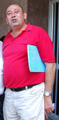 L'alcalde de L'Alqueria d'Asnar i diputat a la diputació d'Alacant, Jaume Pascual i Pascual